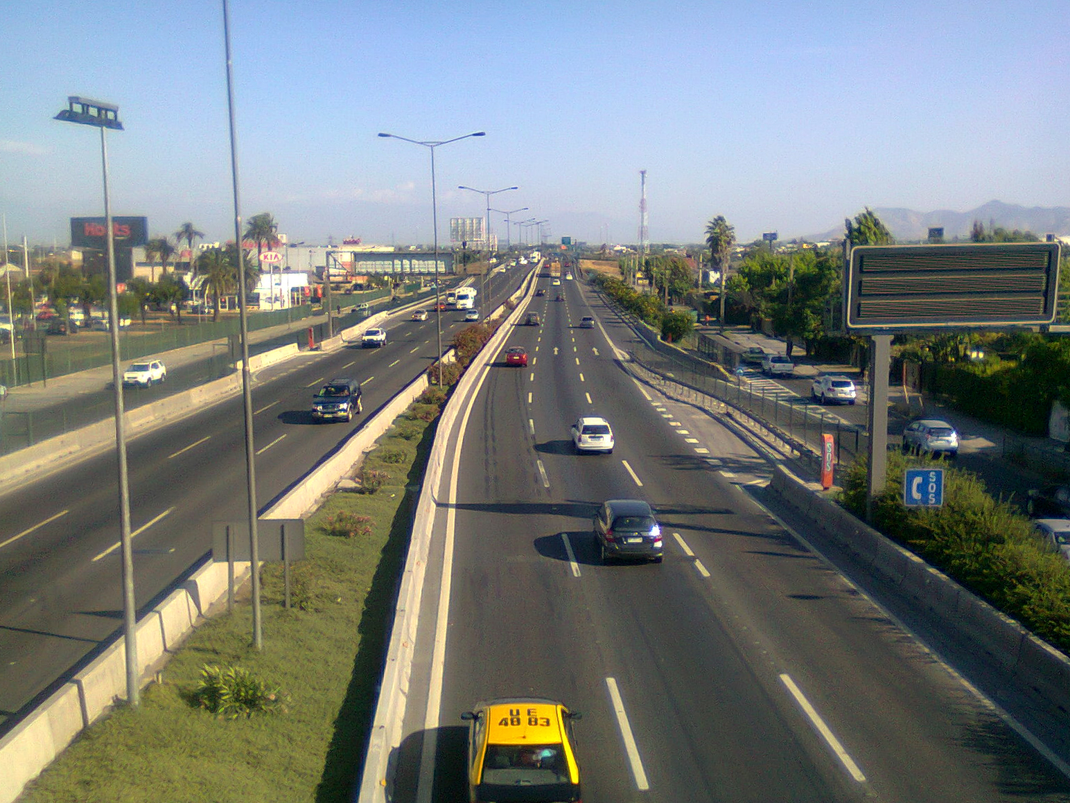 La autopista concesionada Vespucio Norte, ruta 70, fotografiada desde la pasarela peatonal instalada frente al Mall Arauco Maipú. Santiago de Chile, 12 de noviembre de 2011.